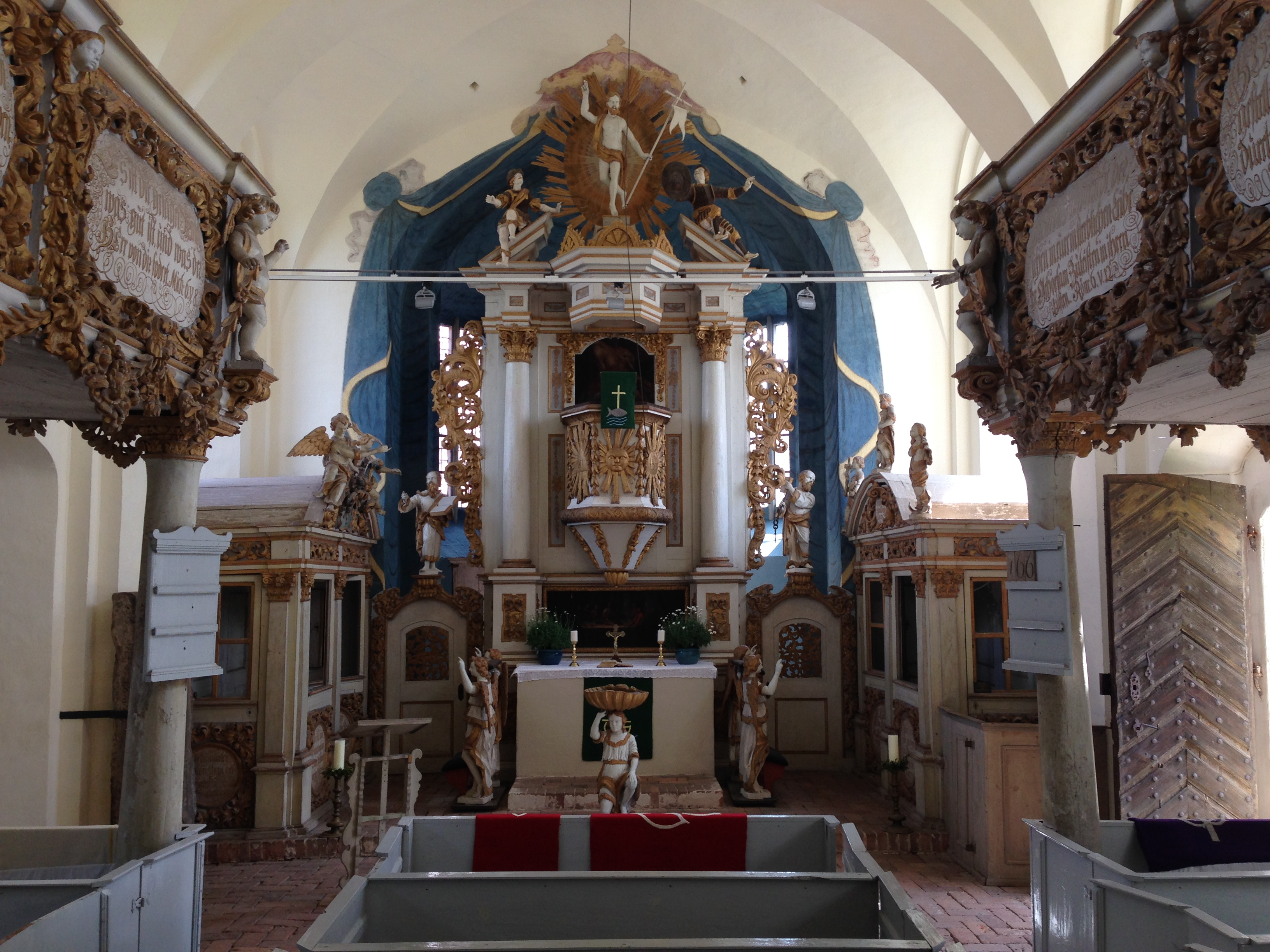 Dorfkirche Altenklitsche, Blick zum Altar mit restaurierter Vorhangmalerei und Emporen, Juni 2016